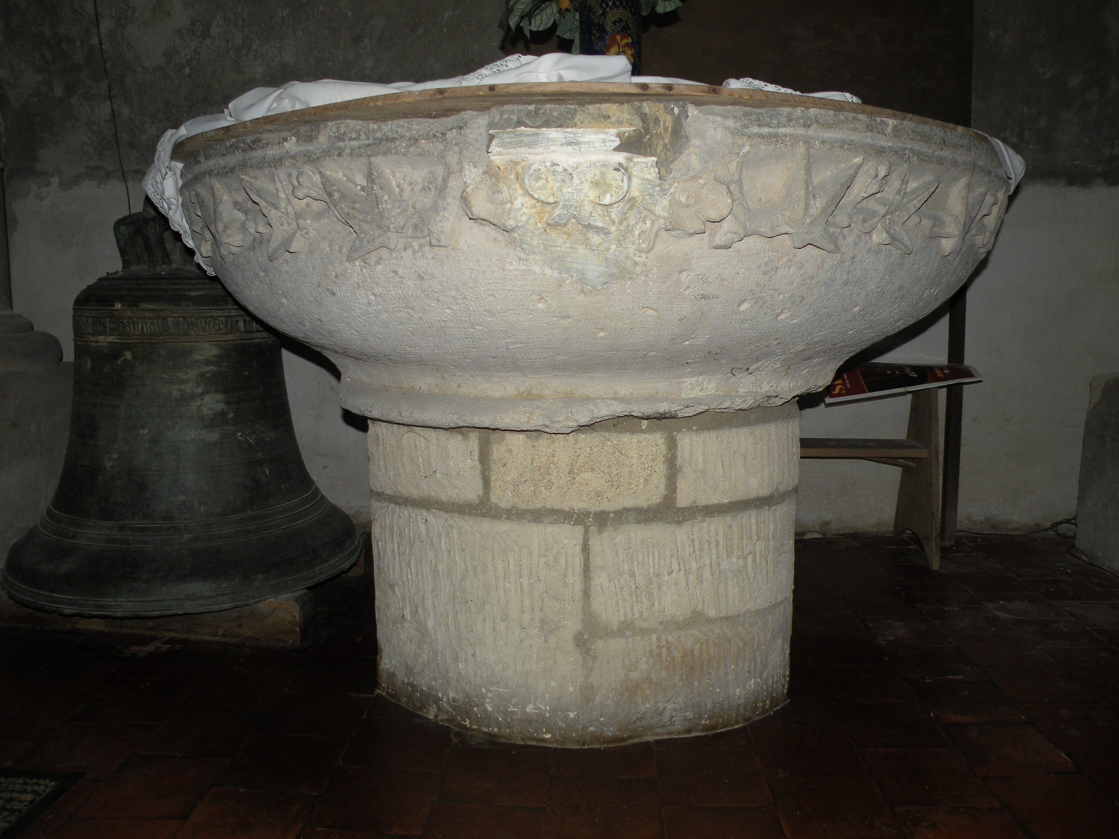 Fonts baptismaux dans l'église Saint-Martin de Vallangoujard provenant de l'église du hameau de Mézières.